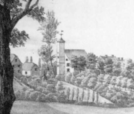 Katholische Kirche Sankt Josef in Wuppertal-Cronenberg 1856